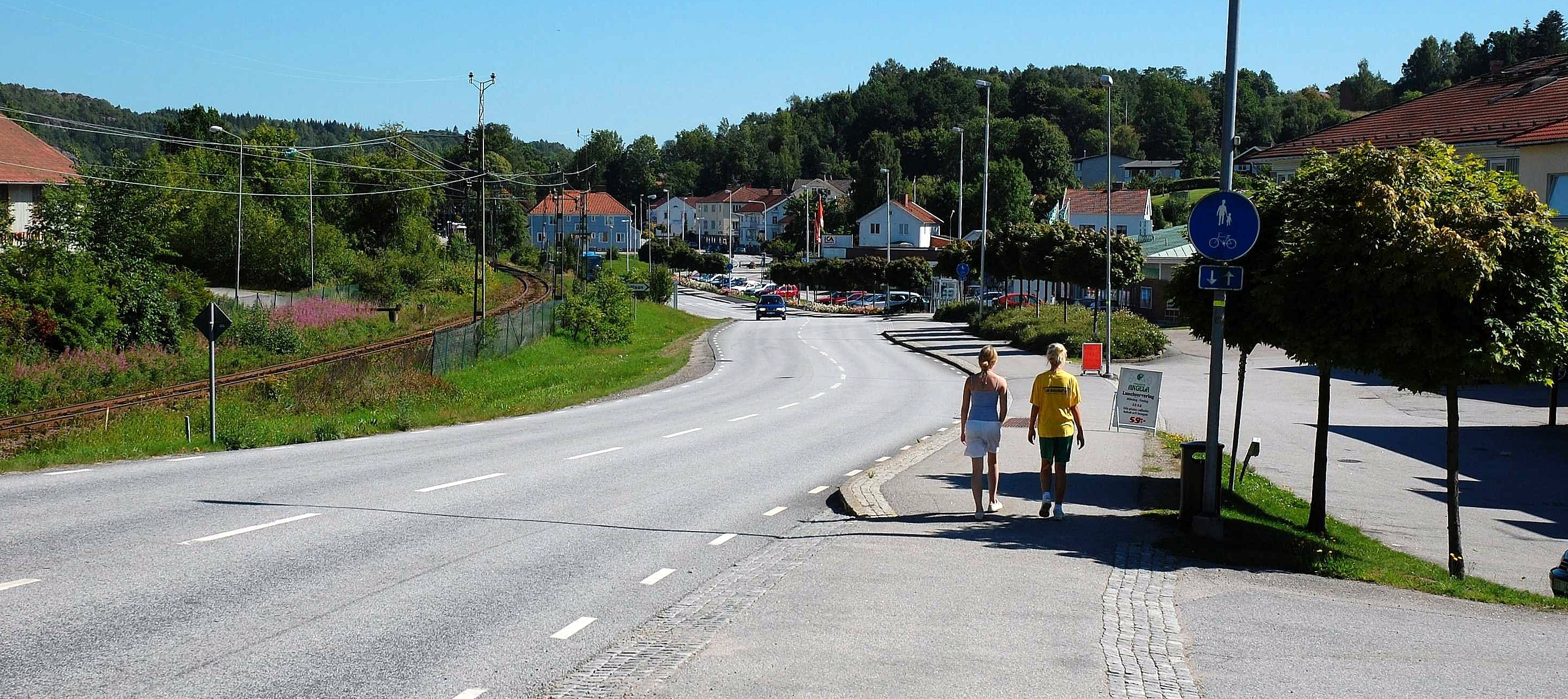 Munkedal, centrum